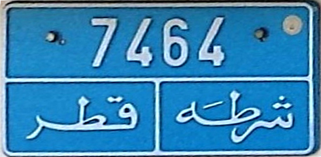 politie Qatar kenteken plaat